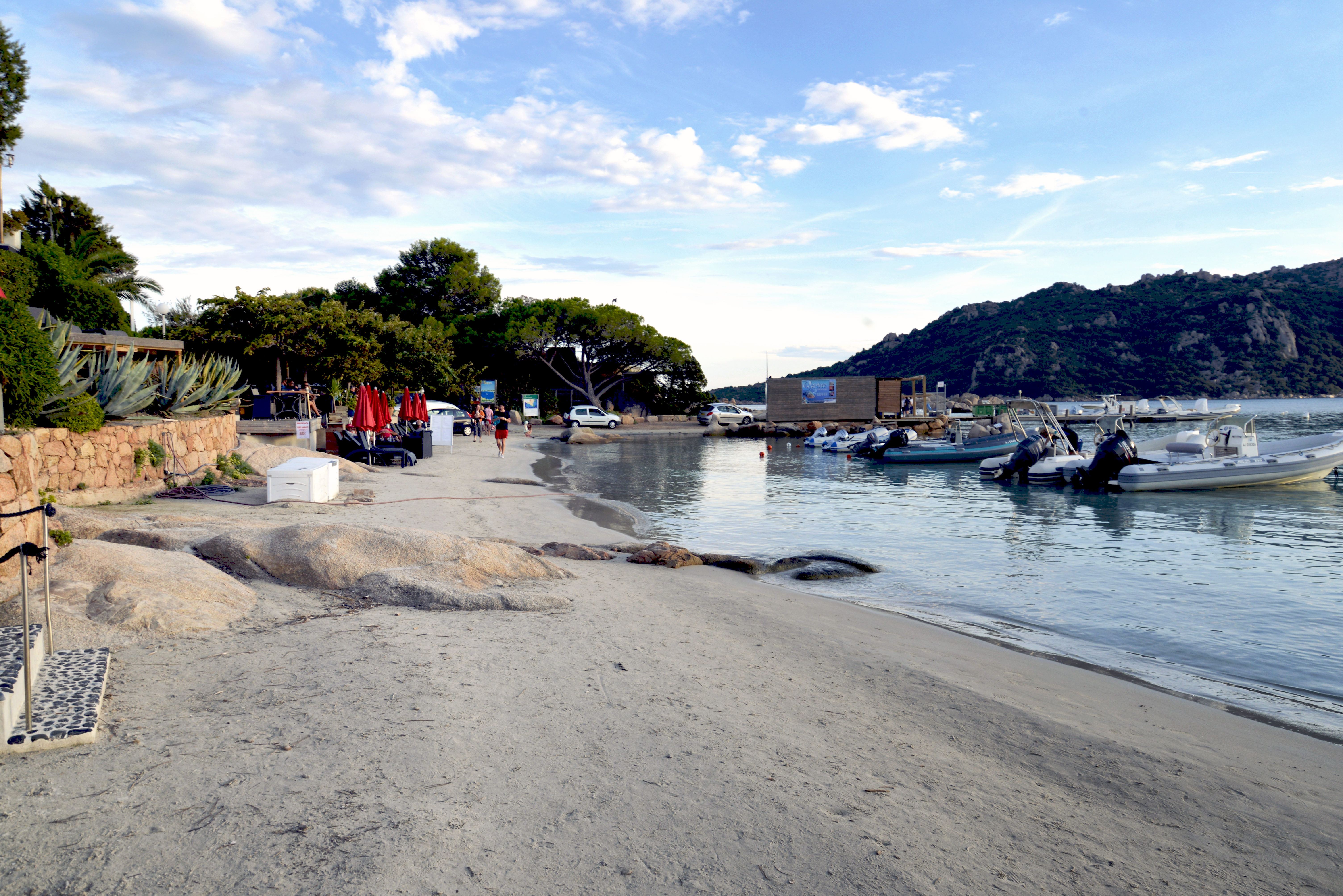 Porto-Vecchio (Corse-du-Sud) - Une fin de saison à la plage de Santa Giulia.